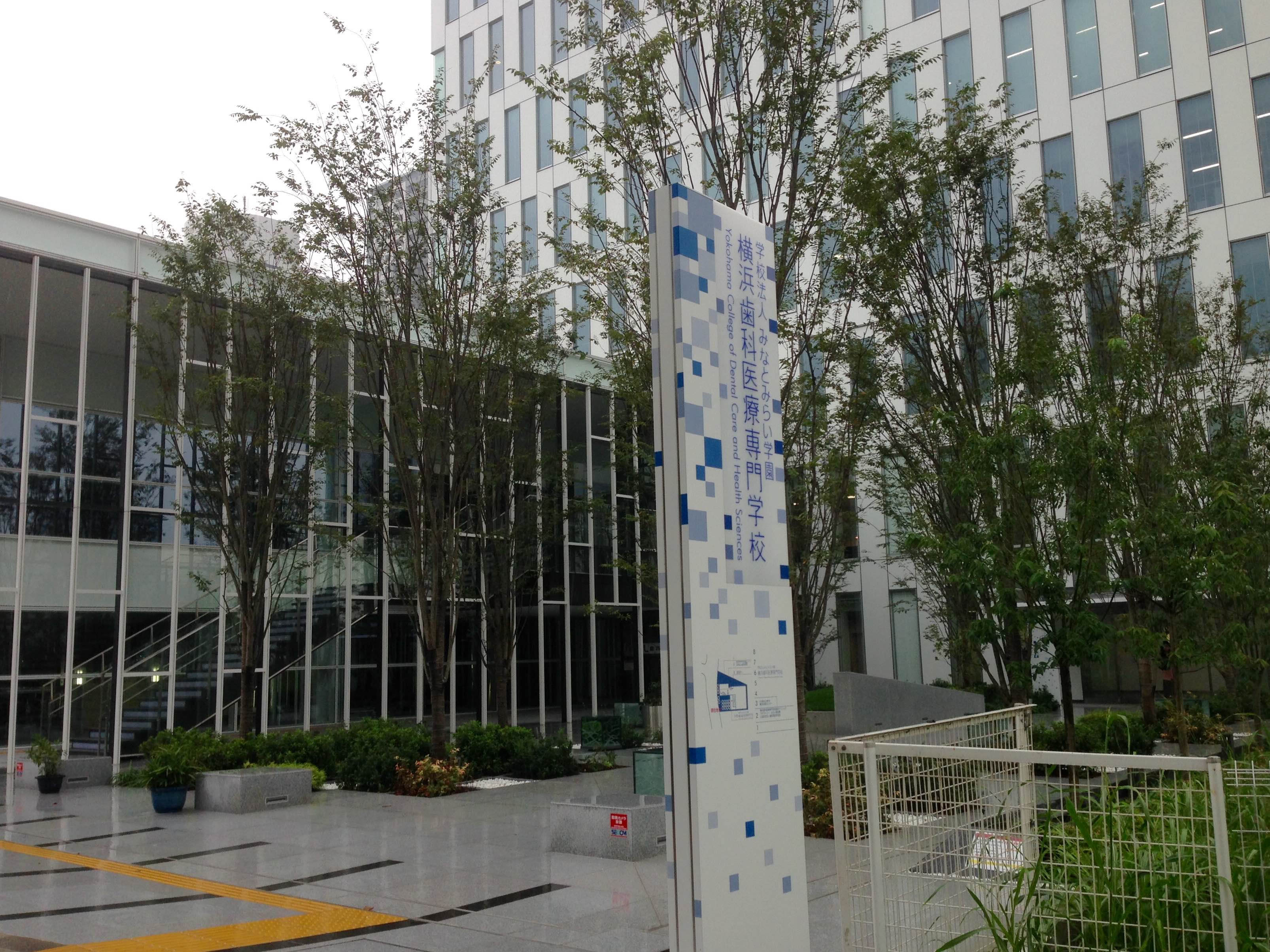 横浜市の歯科専門学校「みなとみらい学園 横浜歯科医療専門学校（旧称：鶴見歯科学園 横浜歯科技術専門学校）」。2016年9月にに移転した。